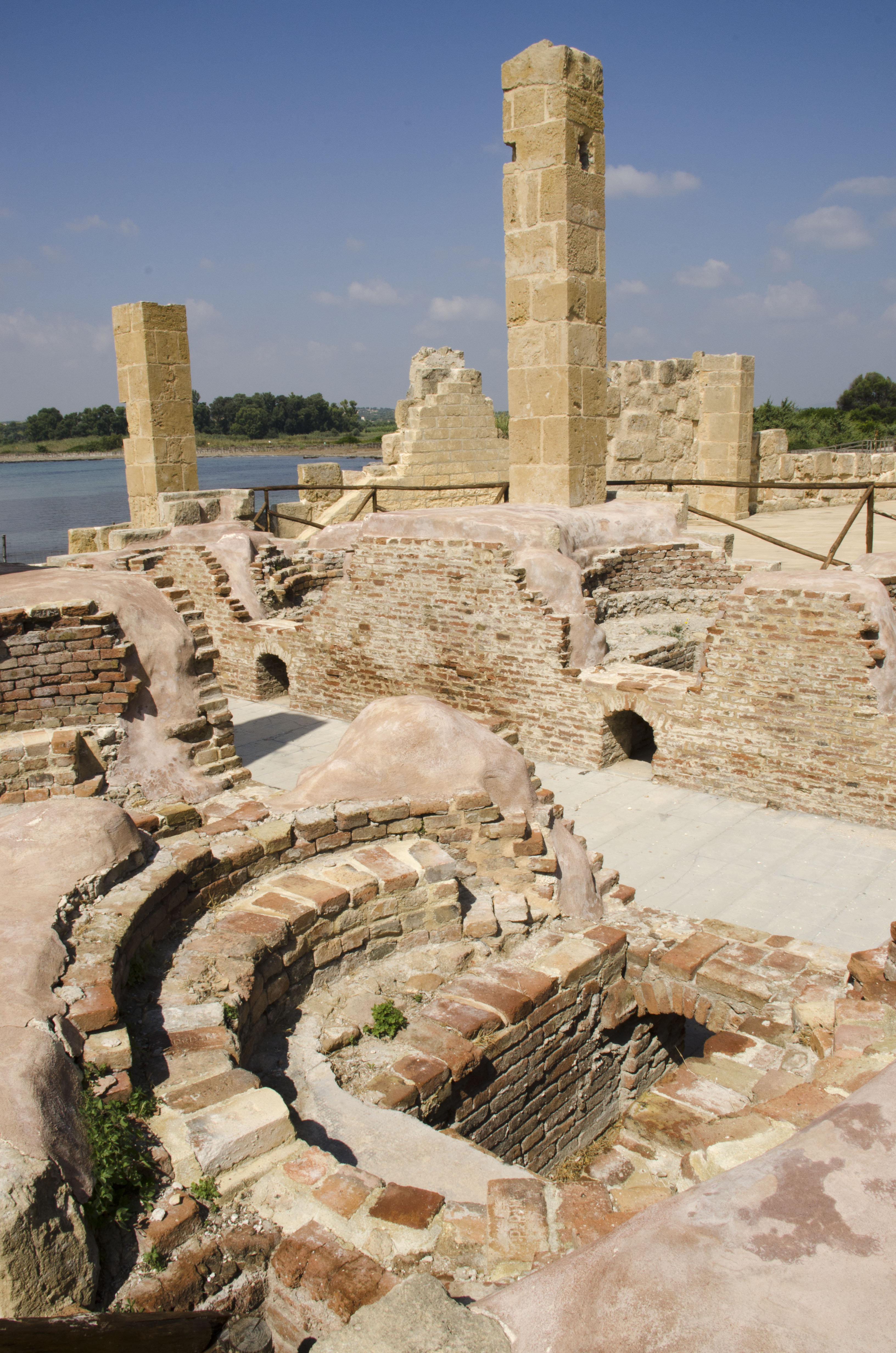 Old tonneria Vendicari, Sicily